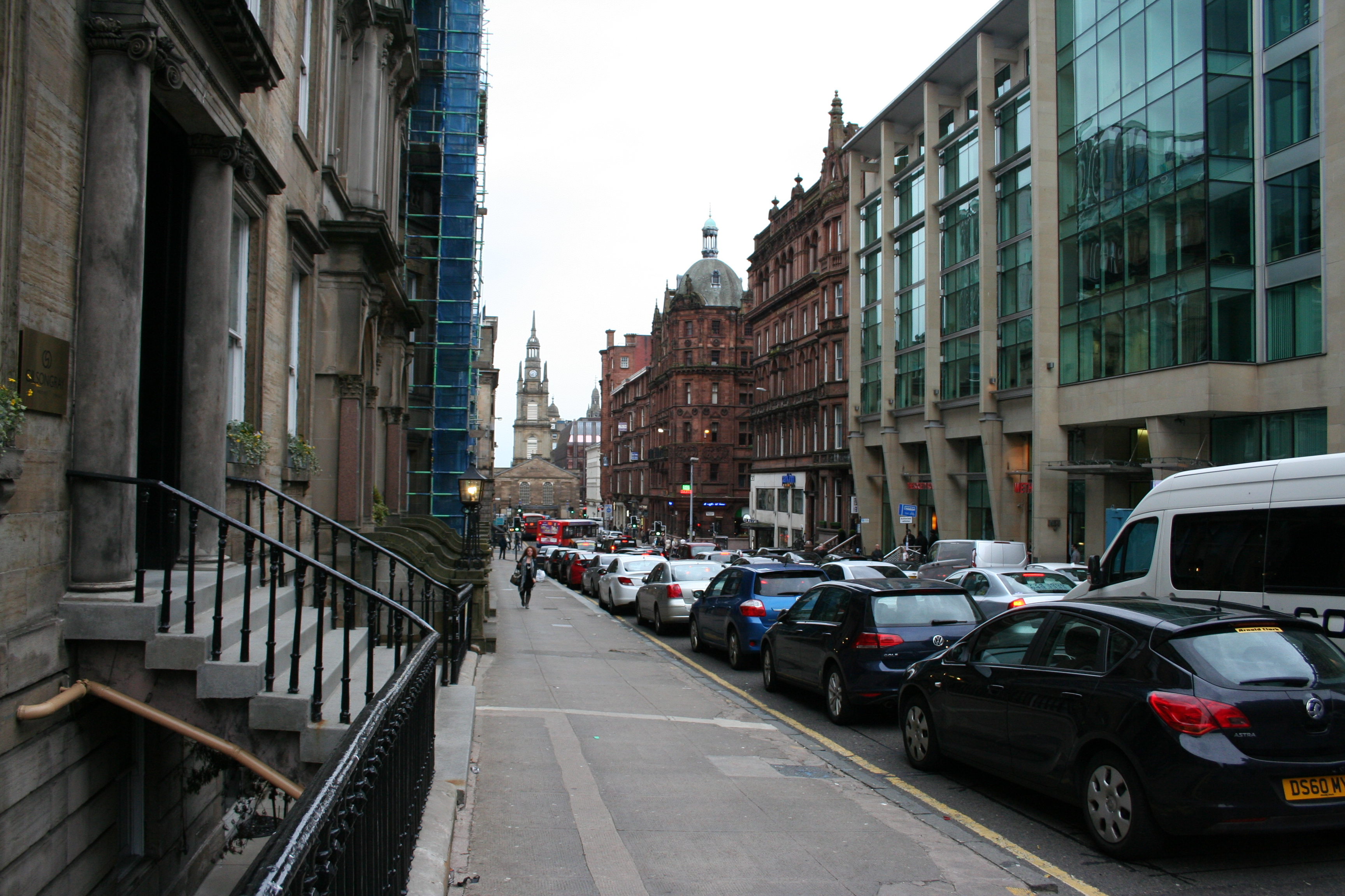 West George Street, Glasgow. Sandsteingebäude mit Kuppelturm rechts ist das vom Architekten William Leiper 1889 erbaute Gebäude der ehem. Sun Fire And Life Insurance (117, 119, 121 West George Street, Mehr Informationen). Im Hintergrund die St George's Tron Parish Church (163 Buchanan Street, Mehr Informationen).